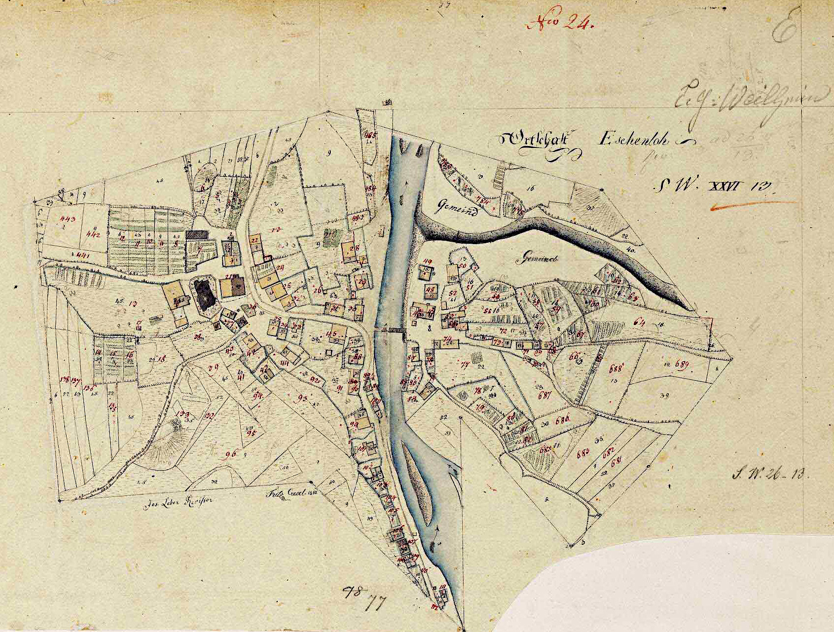 Historische Ortskarte von Eschenlohe von 1810. Maßstab: 1:2500.